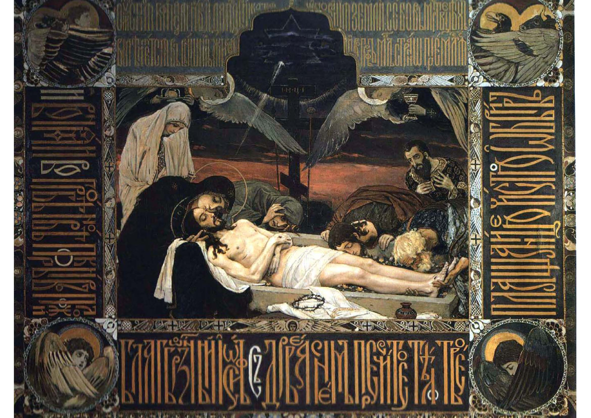 Плащаница во Владимирском соборе в Киеве.